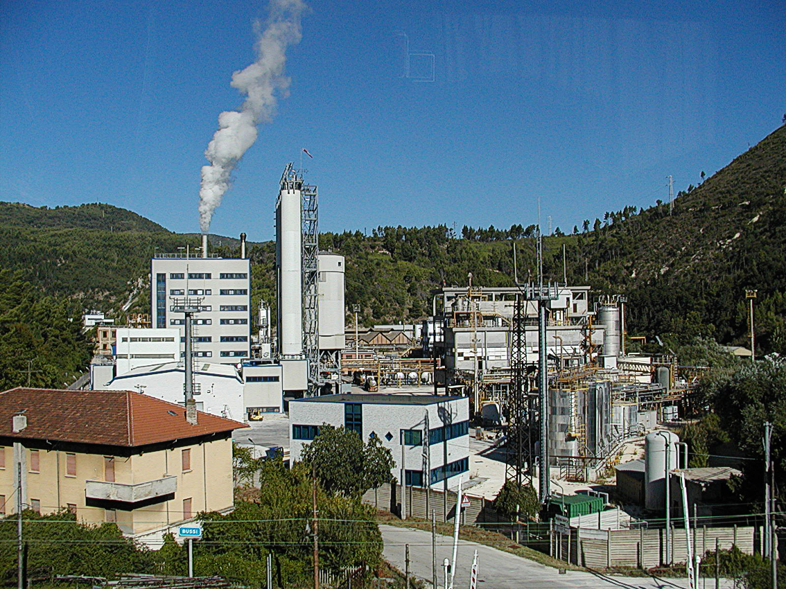 Die Fabrik von Bussi sul Tirino